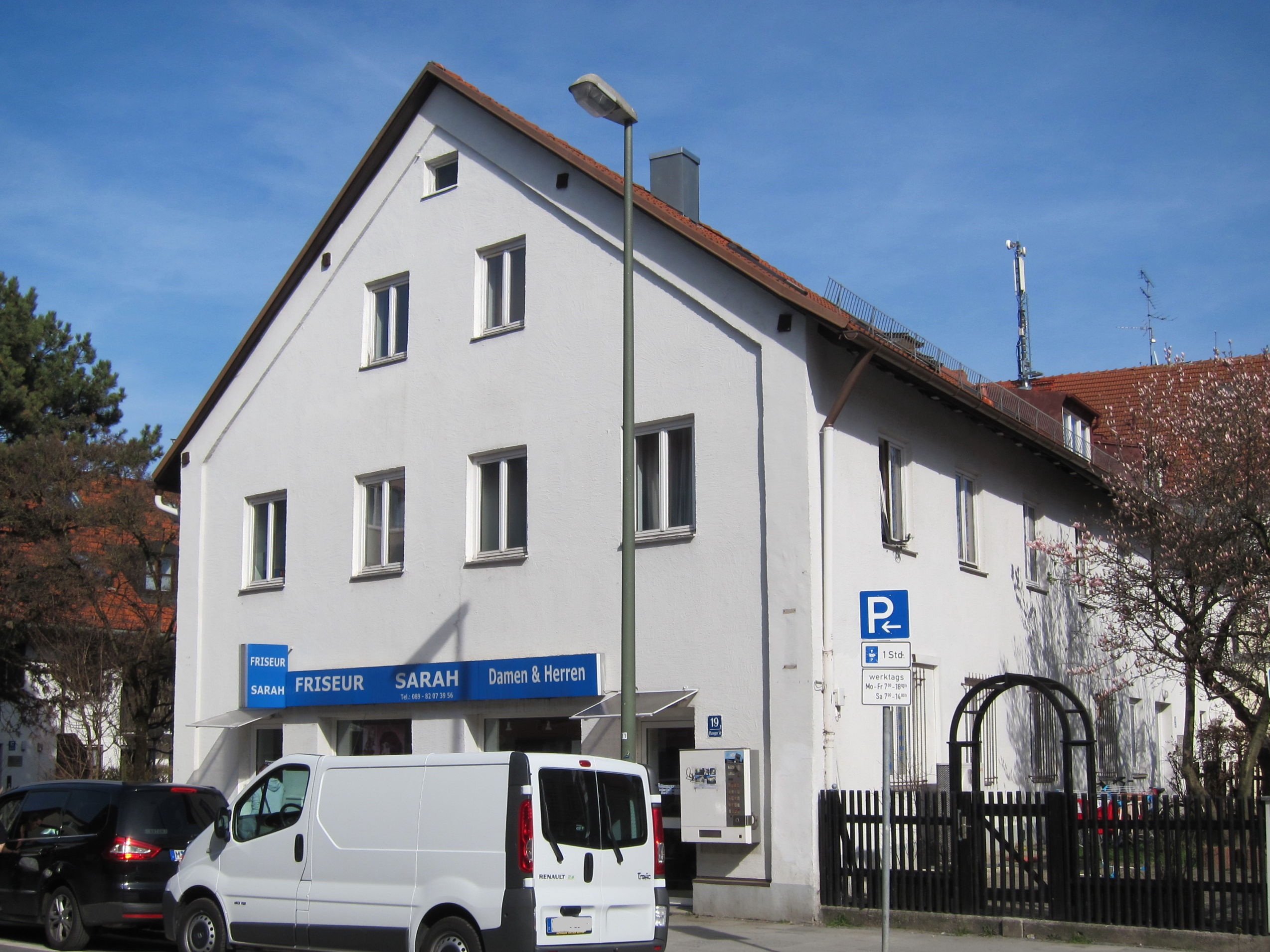 Planegger Straße 19; Ehem. Bauernhaus, im Kern wohl noch 18. Jh., stark verändert.